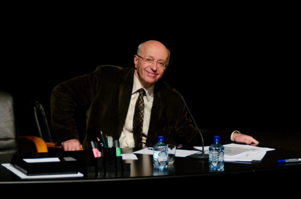 Сергей Кургинян отвечает на вопросы в театре «На досках».